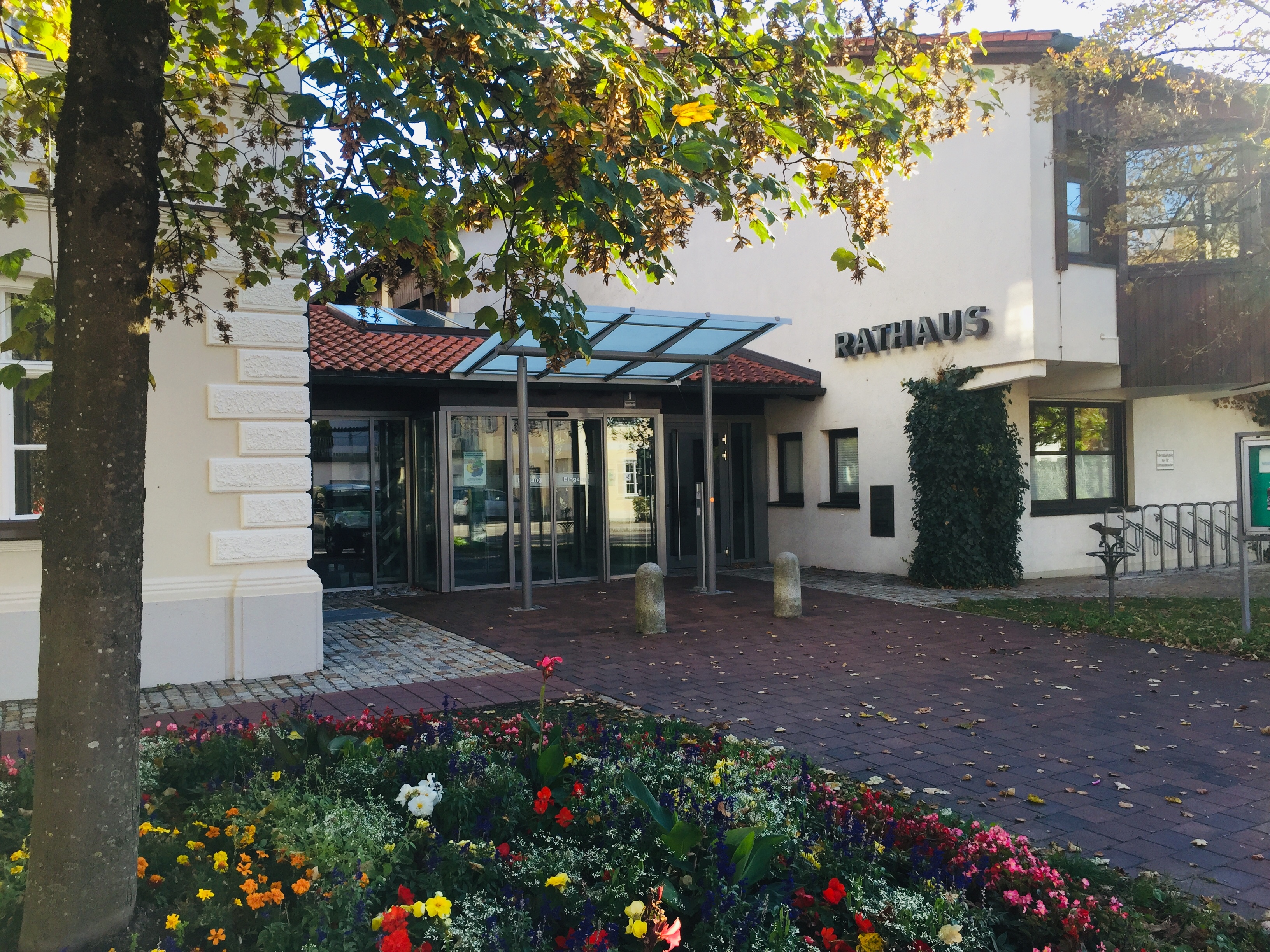 Das Neue Rathaus der Gemeinde Sauerlach wurde 1983 bezogen.